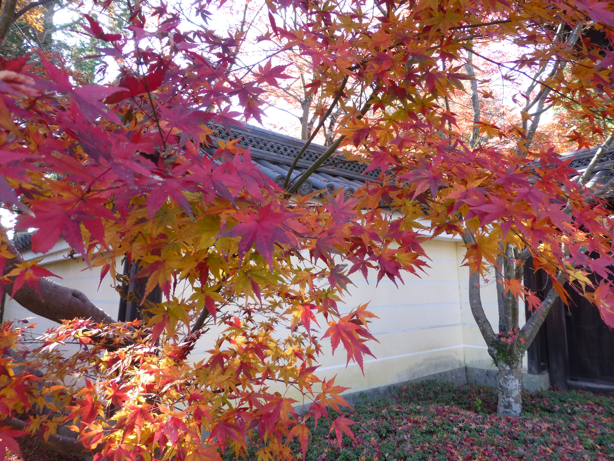 長岡京市光明寺もみじ祭り２